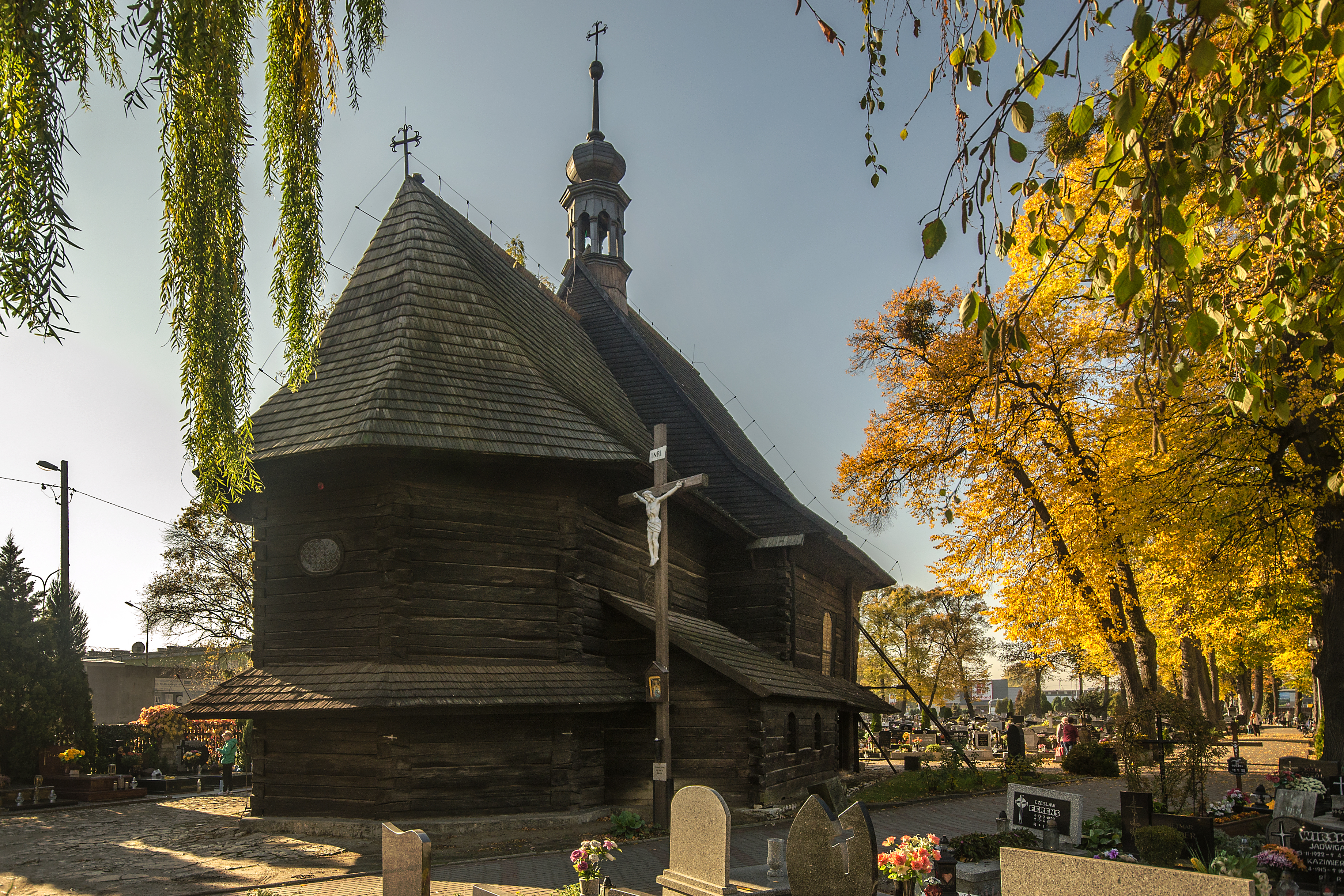 Strzelce Opolskie, kościół pw. św. Barbary, 1683-1690